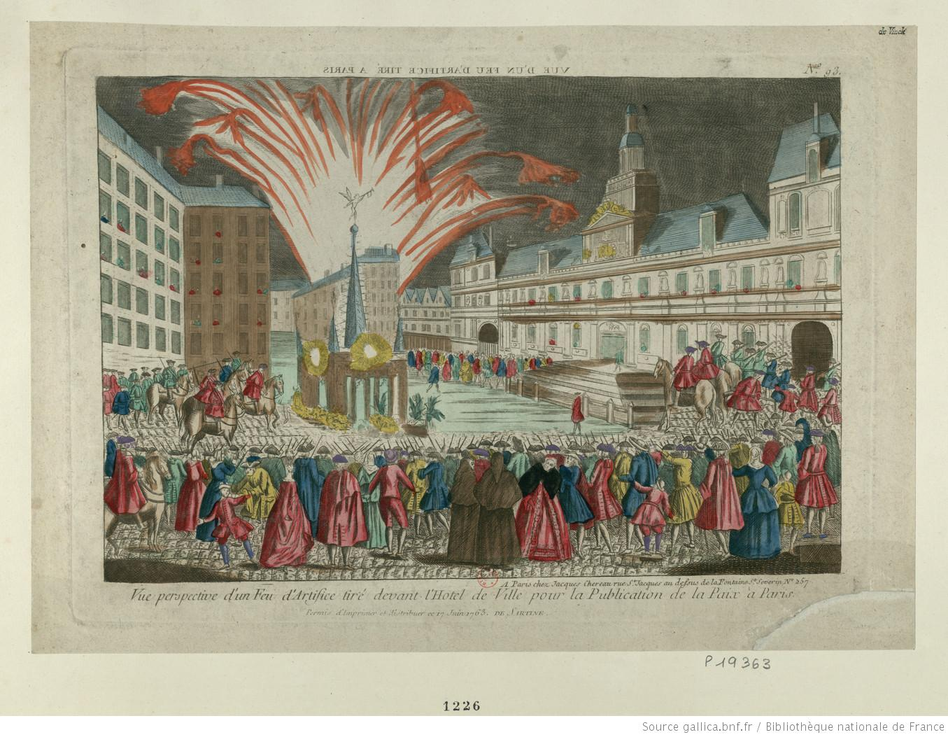 Jacques Chereau (Imprimeur).- Vue perspective d'un Feu d'Artifice tiré devant l'Hôtel de Ville pour la Publication de la Paix à Paris, 1 est. : gravure à l'eau-forte ; 20,7 x 30,8 cm, A Paris chez Jacques Chereau rue Saint Jacques au dessus de la Fontaine Saint Séverin N° 257, 1763. Note(s) : Au-dessus du tr. c., au sommet de la feuille, l'inscription à rebours : "Vue d'un feu d'artifice tiré à Paris." Sous le tr. c., à dr.. Suivent le titre, reproduit en tête de ce numéro, et l'ancien permis d'imprimer : "Permis d'Imprimer et distribuer ce 17 juin 1763. De Sartine." Au haut de l'estampe, au-dessus du tr. c., à dr. : "N° 93". - Vue d'optique coloriée. Cette planche primitivement gravée à l'occasion du traité de Paris, en 1763, et du feu d'artifice tiré à l'occasion de l'érection de la statue de Louis XV de la place Vendôme, le 20 juin 1763, a été rachetée et remaniée manifestement par Chéreau pour la paix de 1783 Réf. bibl. : De Vinck, 1226 A dr., l'hôtel de ville ; au milieu, vu du côté gauche, le feu d'artifice décrit sous notre numéro De Vinck 1224. Au premier plan le public maintenu par un cordon de gardes françaises et vu de dos